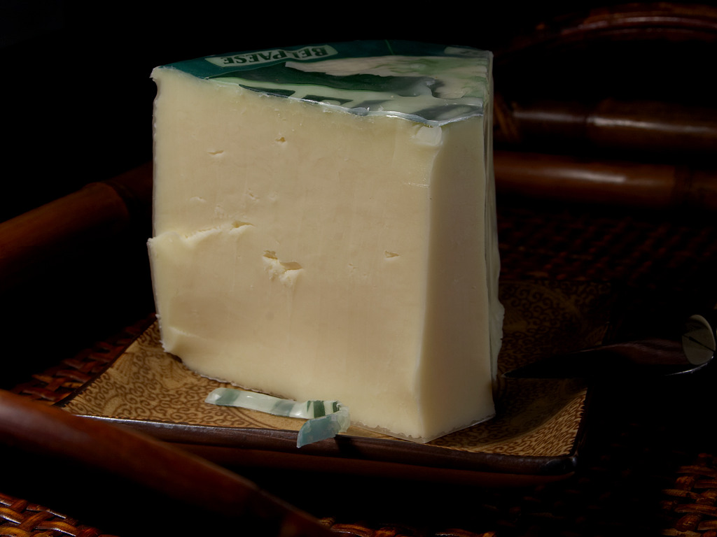 Bel Paese Cheese